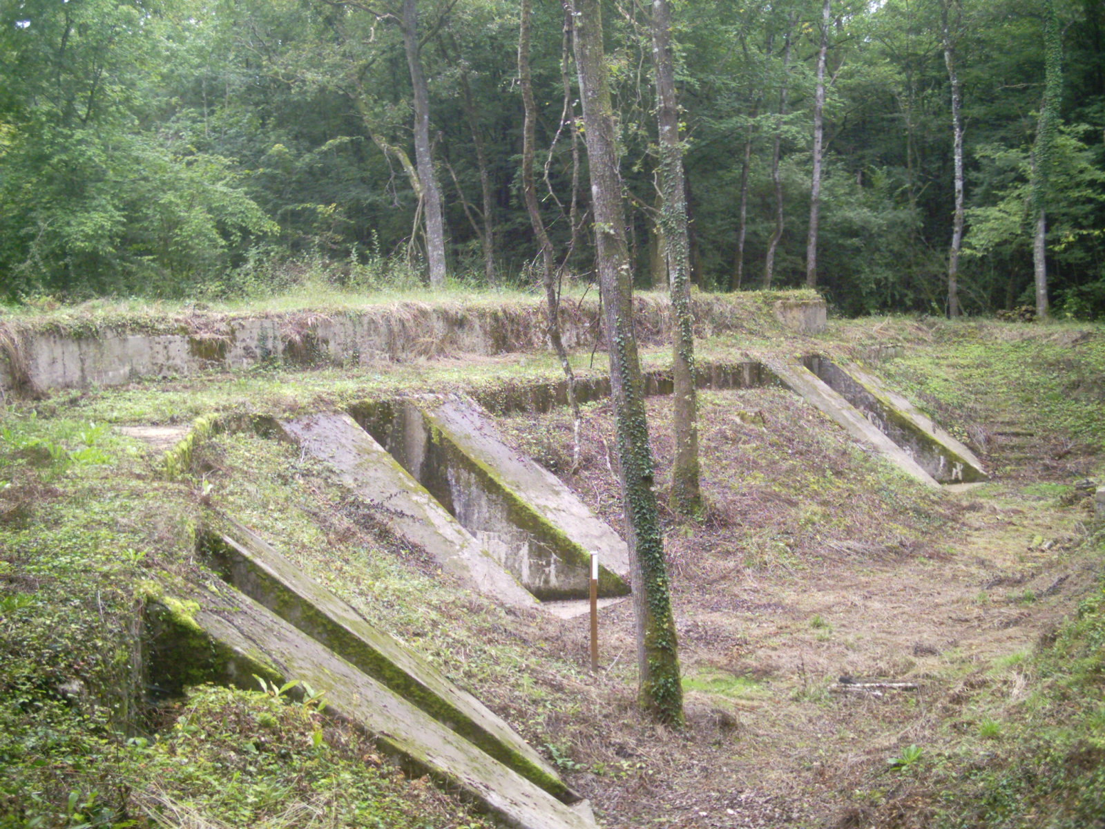 Fort du Vieux Canton, ouvrage du mauvais Lieu